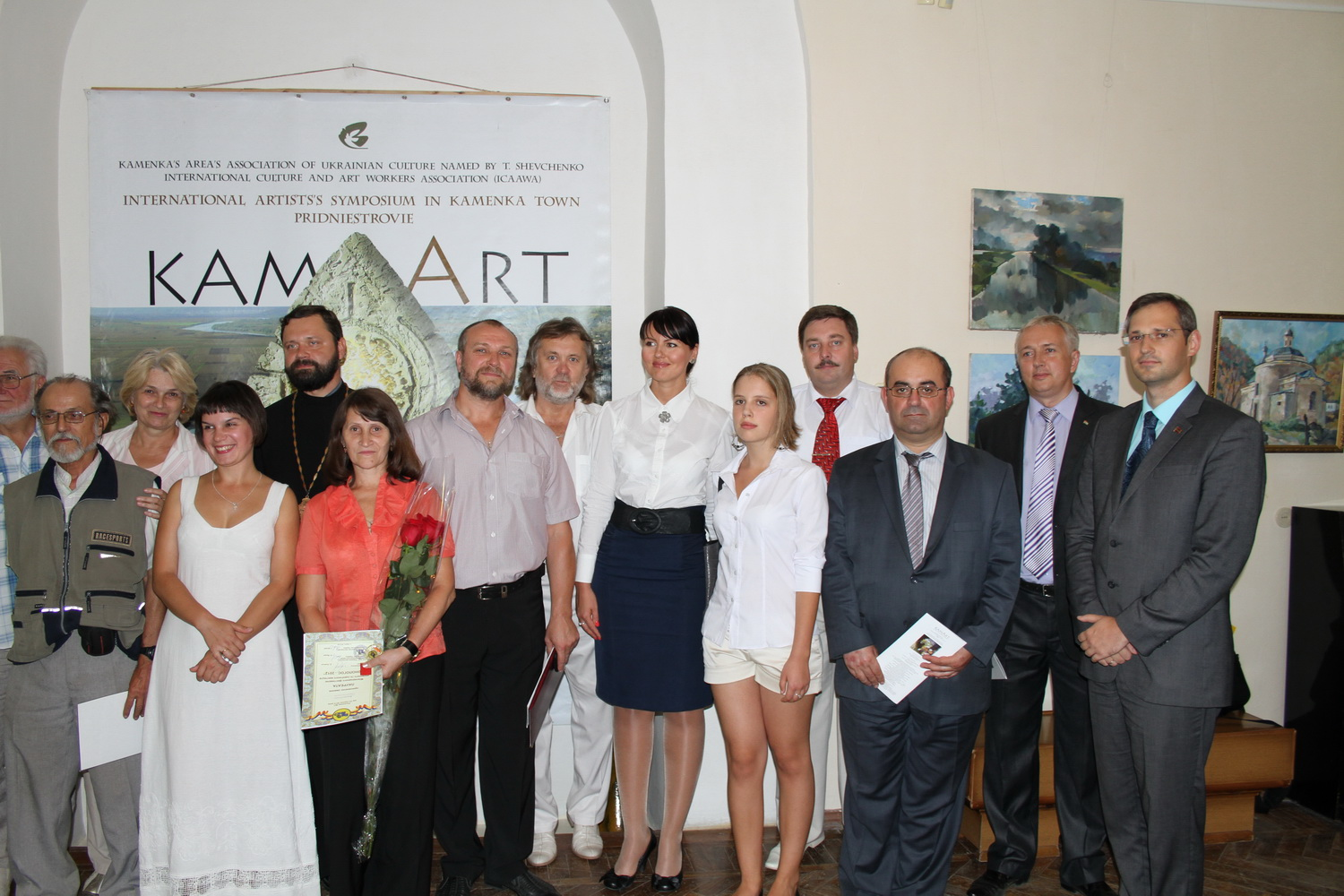 Открытие выставки «КамАрт», приуроченной к 22-ой годовщине образования Приднестровской Молдавской Республики, в Республиканской картинной галерее им. Лосева